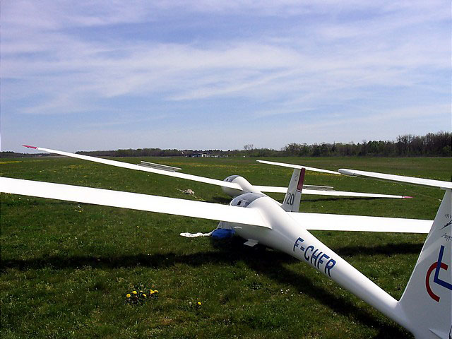 Planeurs alignés sur l'aérodrome d'Angers Marcé au printemps 2004. Au premier plan : un Centrair Pégase 90, au second plan : un Schneider LS4.